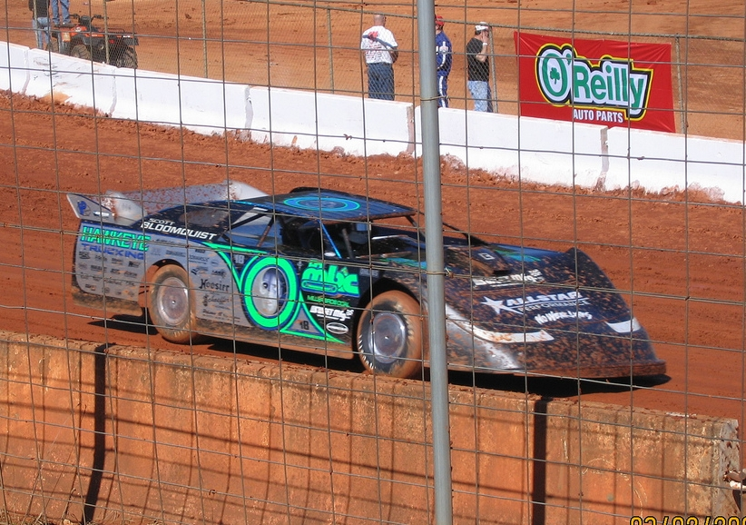 Dirt Late model driver Scott Bloomquist 2008 racecar